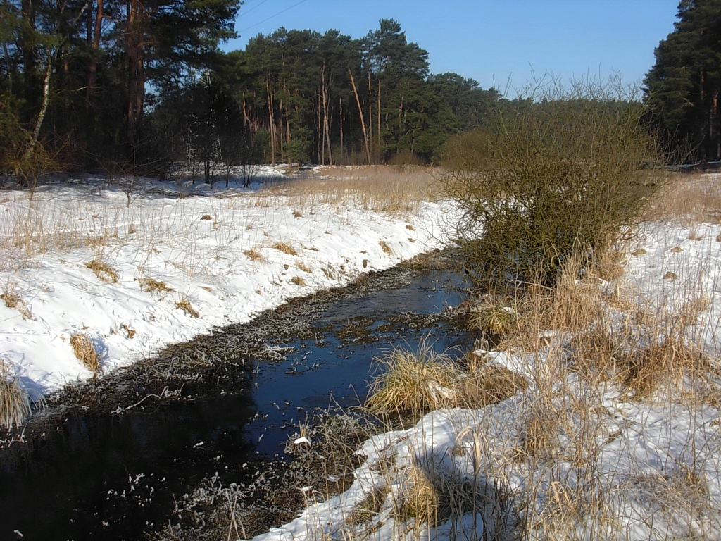 Struga Młyńska – dopływ Kanału Bydgoskiego w dolinie Podprądy na granicy gminy Białe Błota i osiedla Miedzyń-Prądy w Bydgoszczy